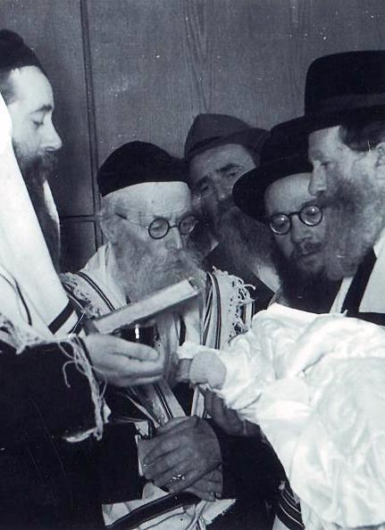 החזון איש משמש כסנדק בברית מילה, תל אביב מחזיק את כוס היין עם הטלית רבי יונה שטנצל סוף שנות ה-40 של המאה ה-20